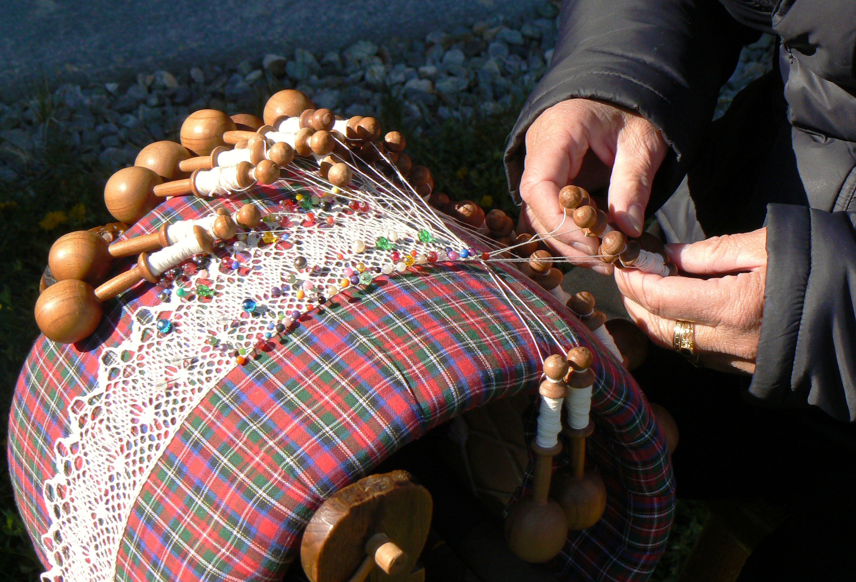 Lavorazione delle dentelles di Cogne